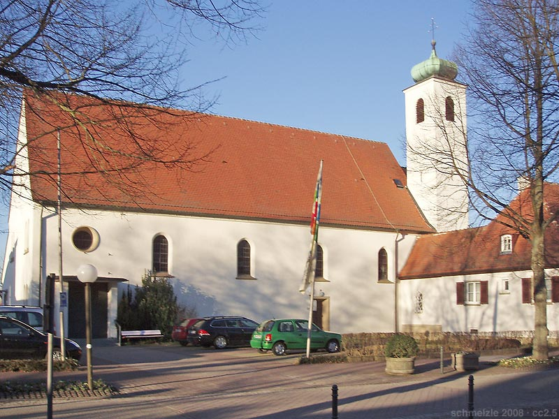 Kath. Kirche zum Heiligsten Herzen Jesu in Bad Rappenau